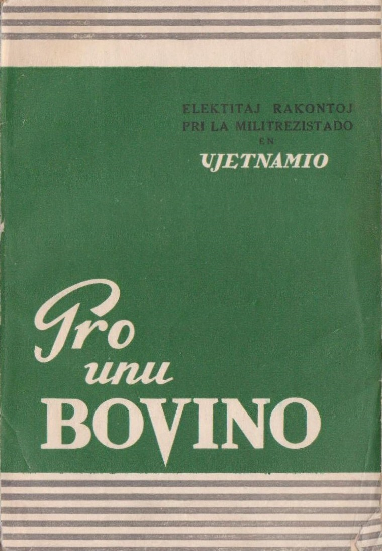 librokovrilo de "Pro unu Bovino", 1960